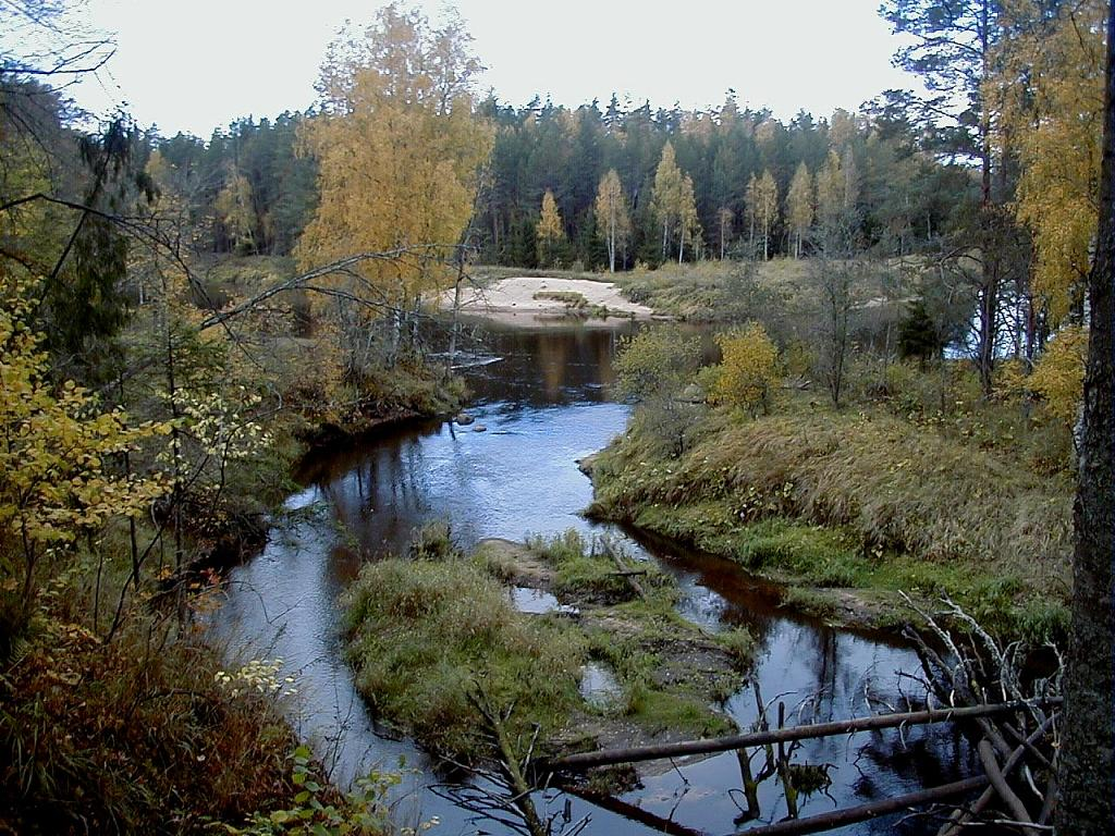 Vija pie ietekas Gaujā. 2004-10-09